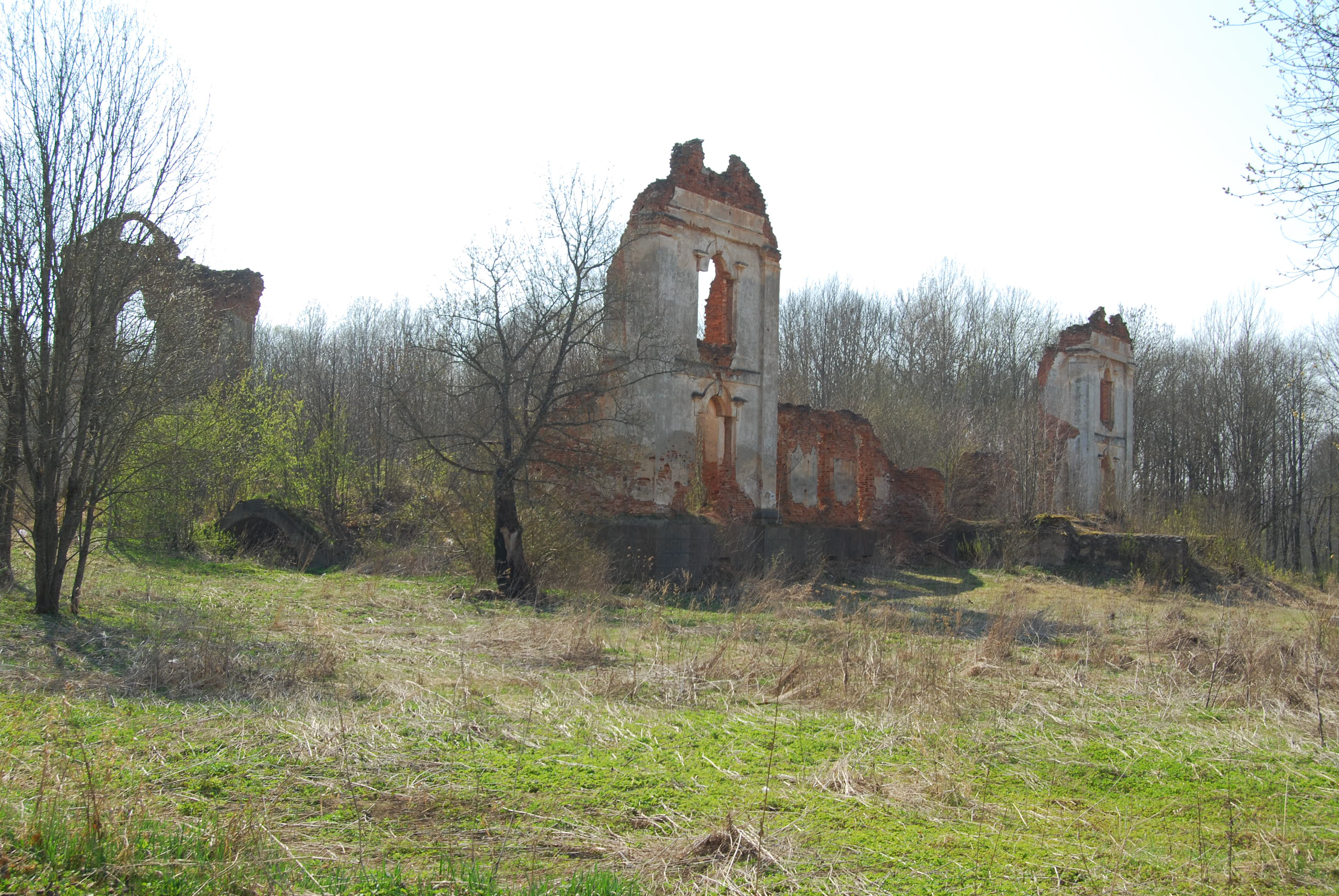 Paulavos Respublikos dvaro liekanos